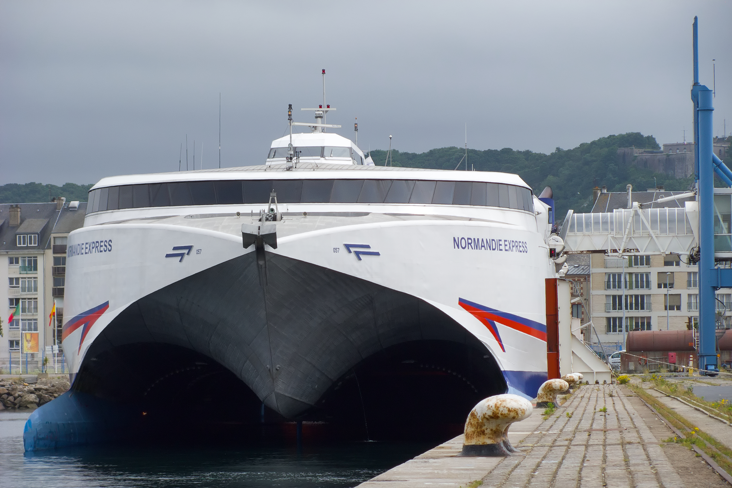 Bateau Normandie Express à la gare maritime de Cherbourg